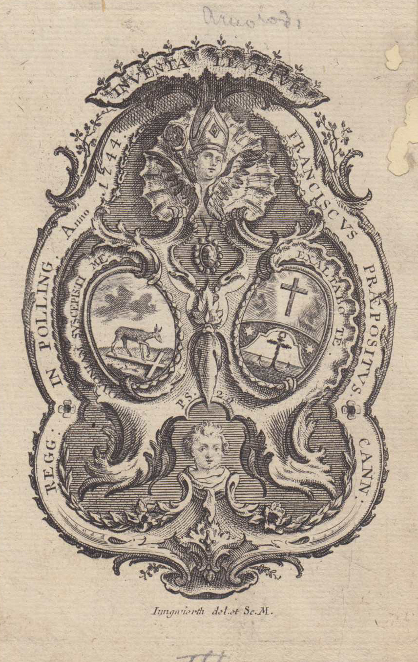 Ex libris, Augustinerchorherrenstift Polling, Propst Franz Töpsl